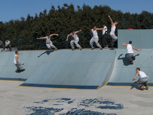 Roller, rampe.